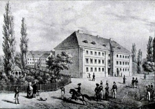 Червоний кляштор: колегіум театин